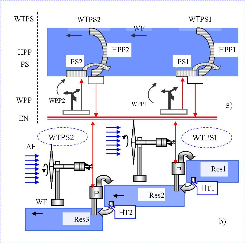 Каскадне розташування вітротурбінних гідроакумулювальних електростанцій